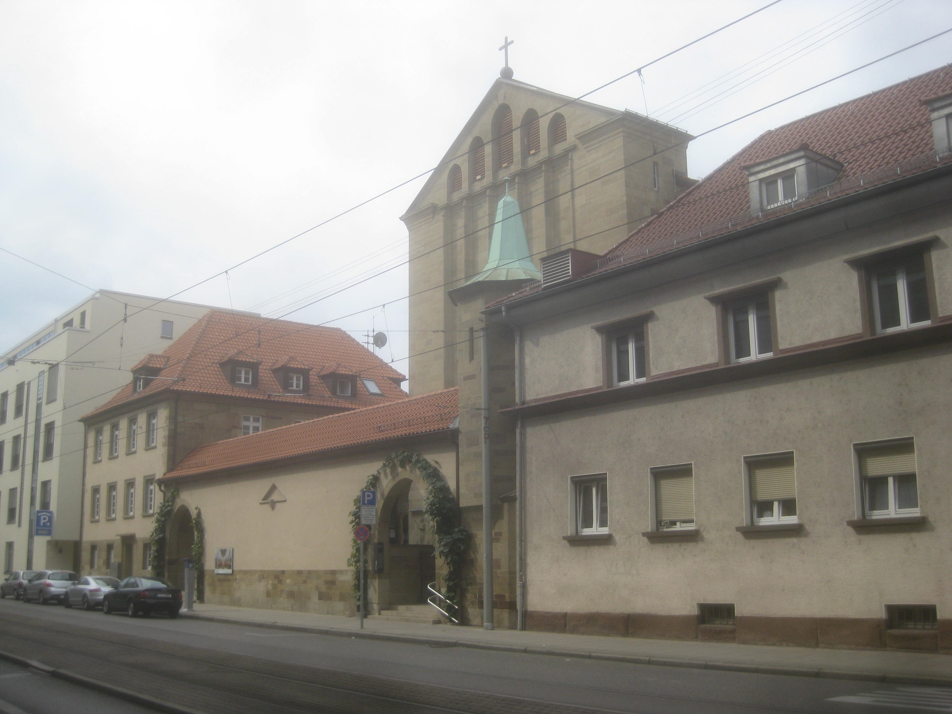 Straßenfront der katholischen St. Fideliskirche in Stuttgart. Links: Pfarrhaus, rechts: Hoppenlau-Schule.